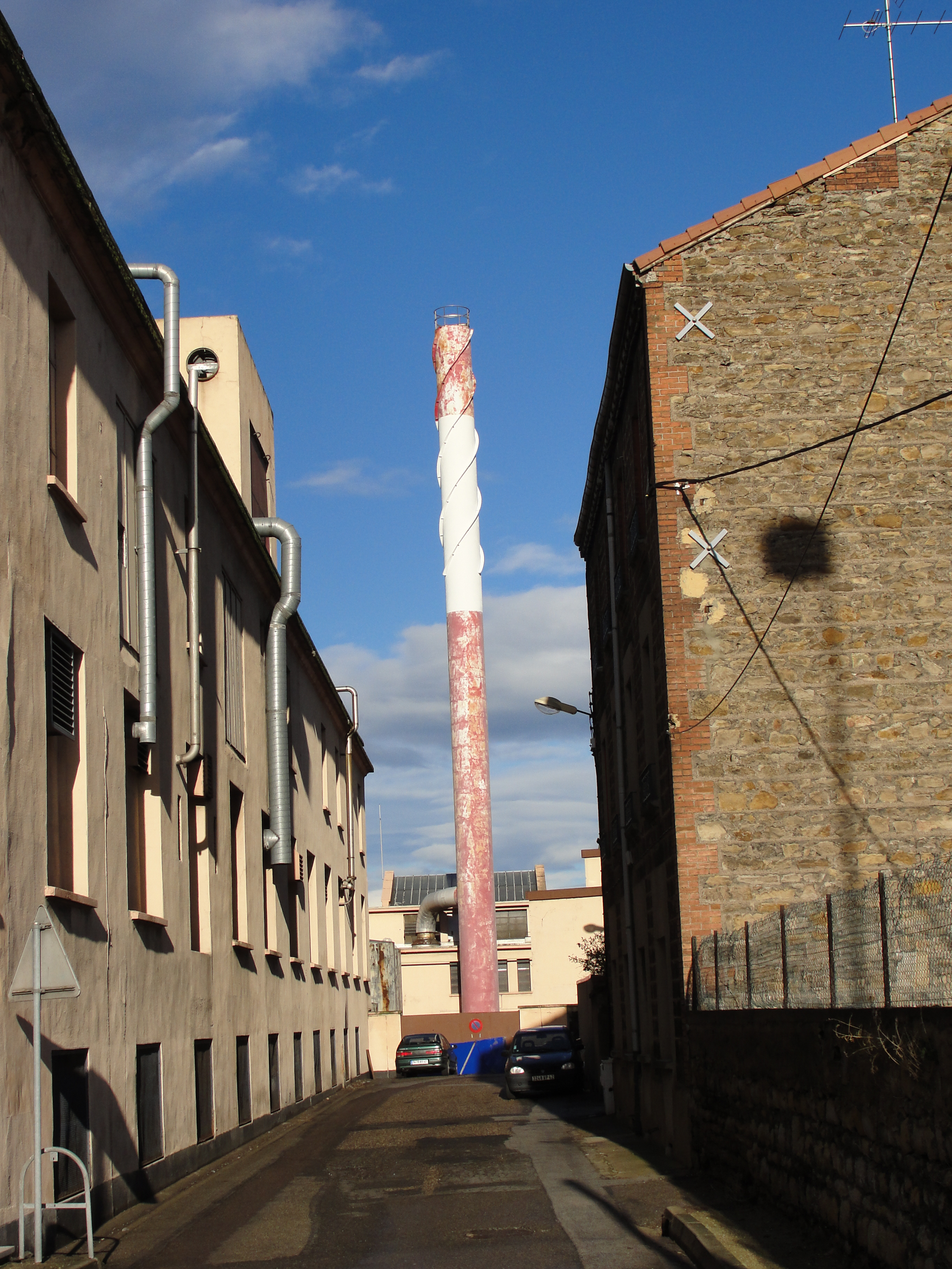 Usine NatraZahor à St-Etienne (France), cheminée depuis l'accès par la rue Ferrer - hiver 2009.